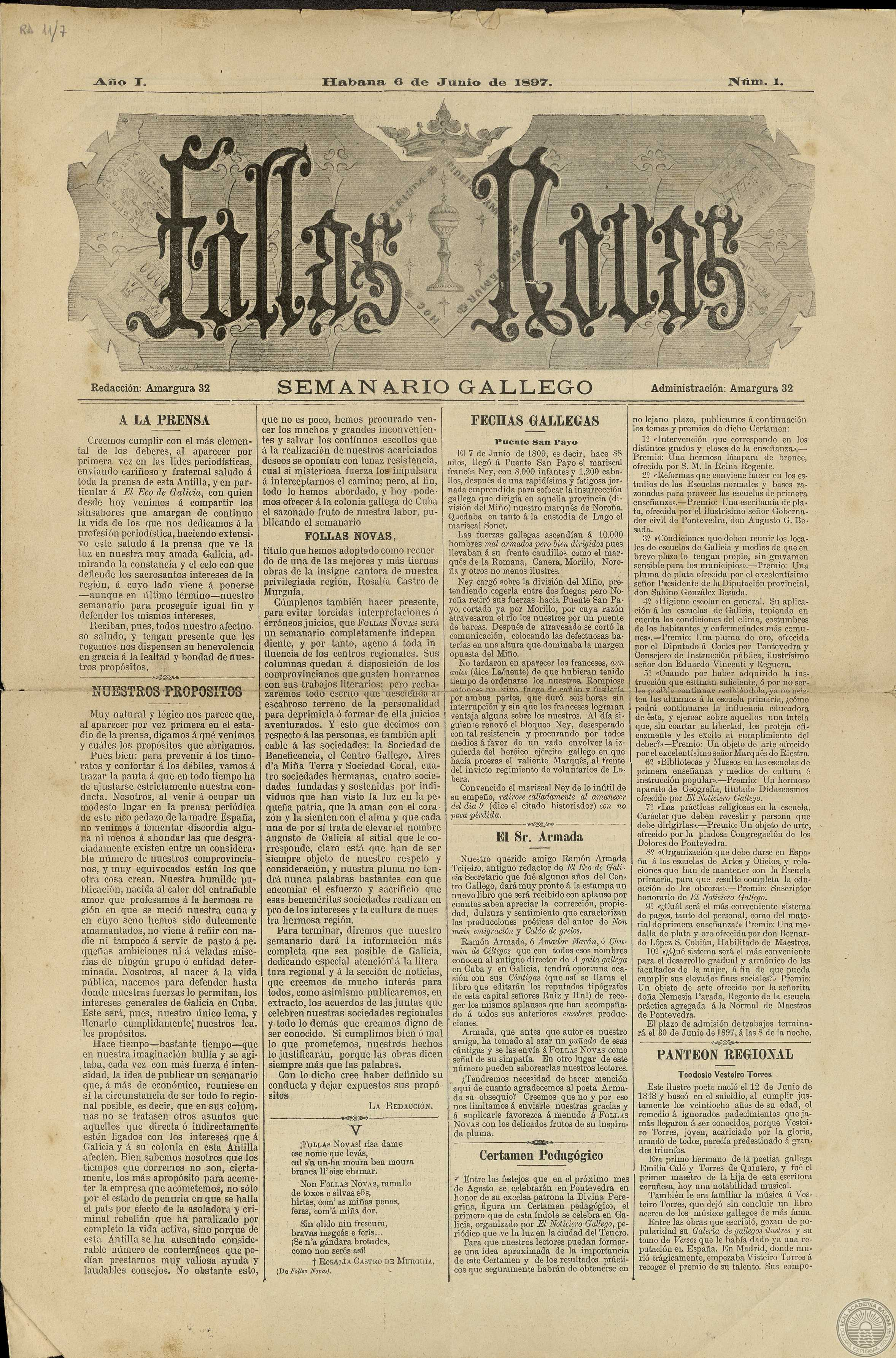 Número 1 de Follas Novas, semanario publicado na Habana.